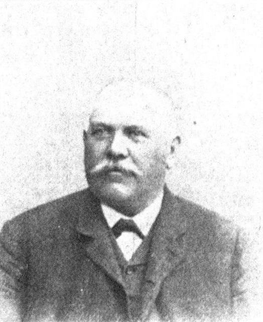 Österreichischer Politiker, Reichsratswahl 1907, Name siehe Dateiname